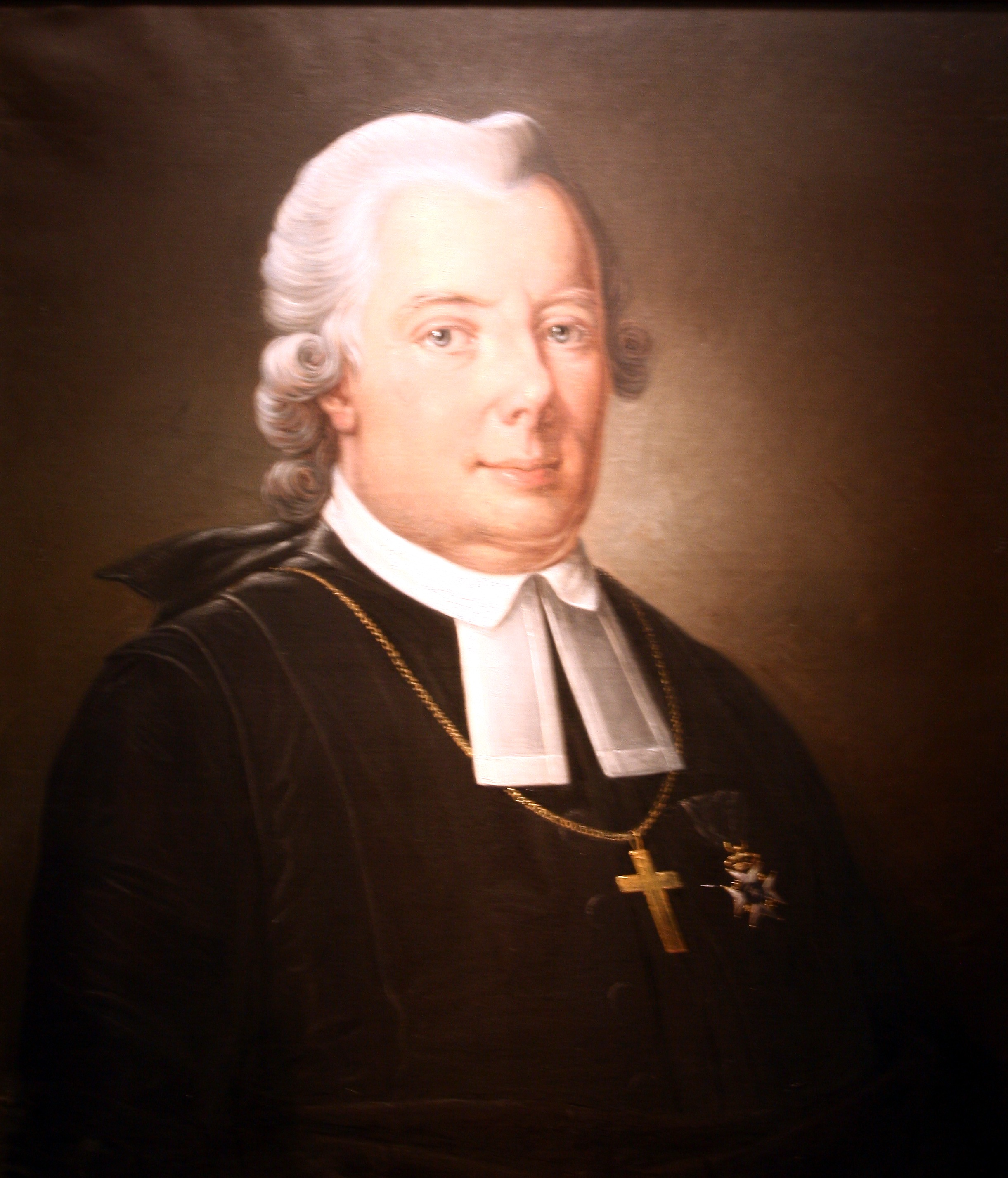 Martin Georg Wallenstråle